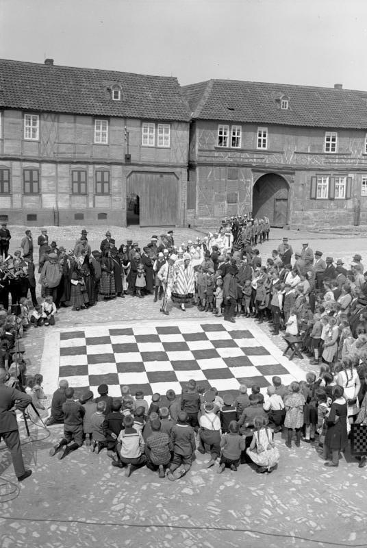 Lebendes Schachspiel in dem deutschen Schachdorf Ströbeck bei Halberstadt ! Zum erstenmal fand in dem deutschen Schachdorf Ströbeck auf dem Marktplatz ein lebendes Schachspiel statt ! Die Teilnehmer am lebenden Schachspiel begeben sich in historischer Tracht zum Schachspiel auf den Marktplatz in Ströbeck.